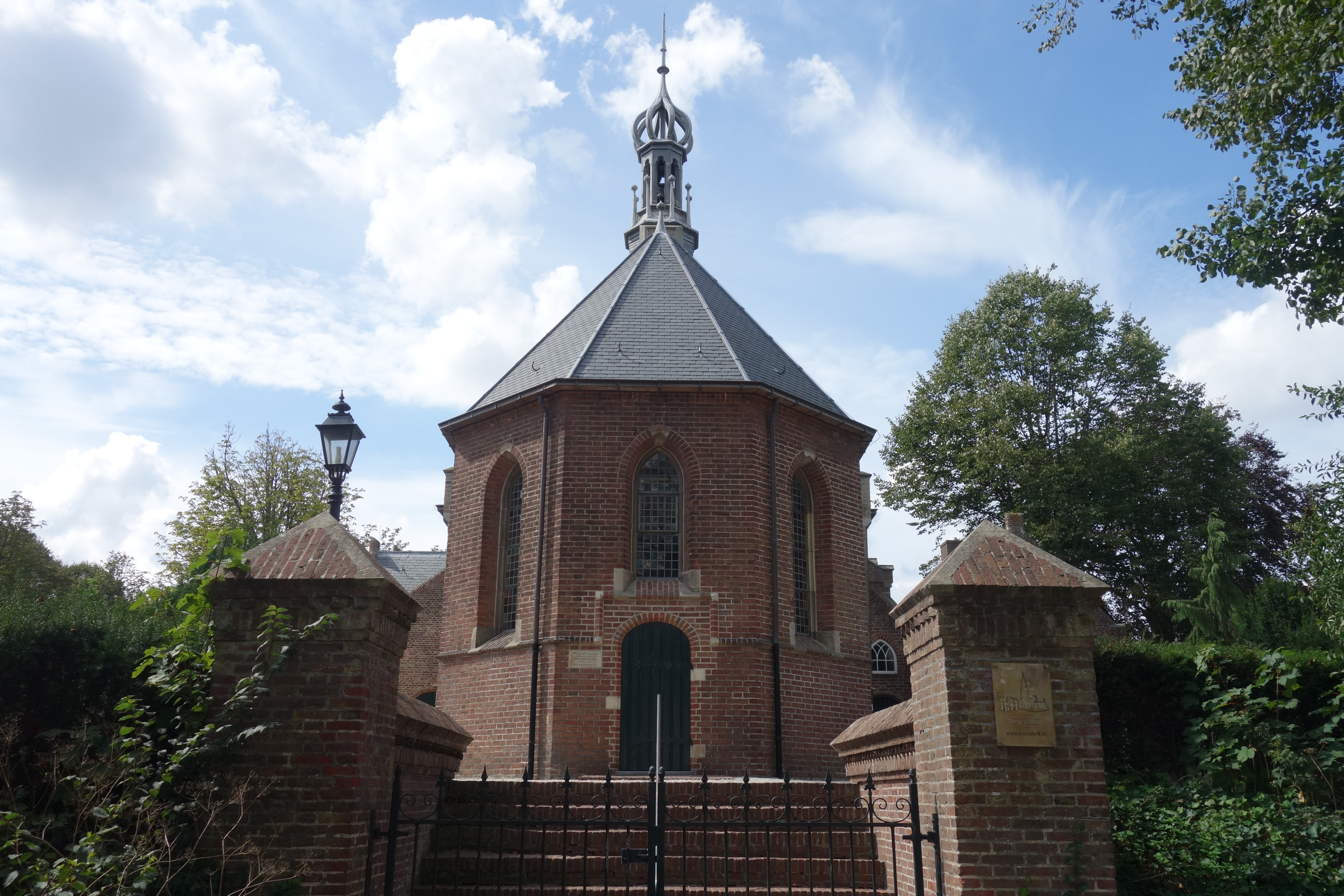 De Kleine Kerk van Voorthout gezien vanaf de Doctor Aletta Jacobslaan ten westen van de kerk.